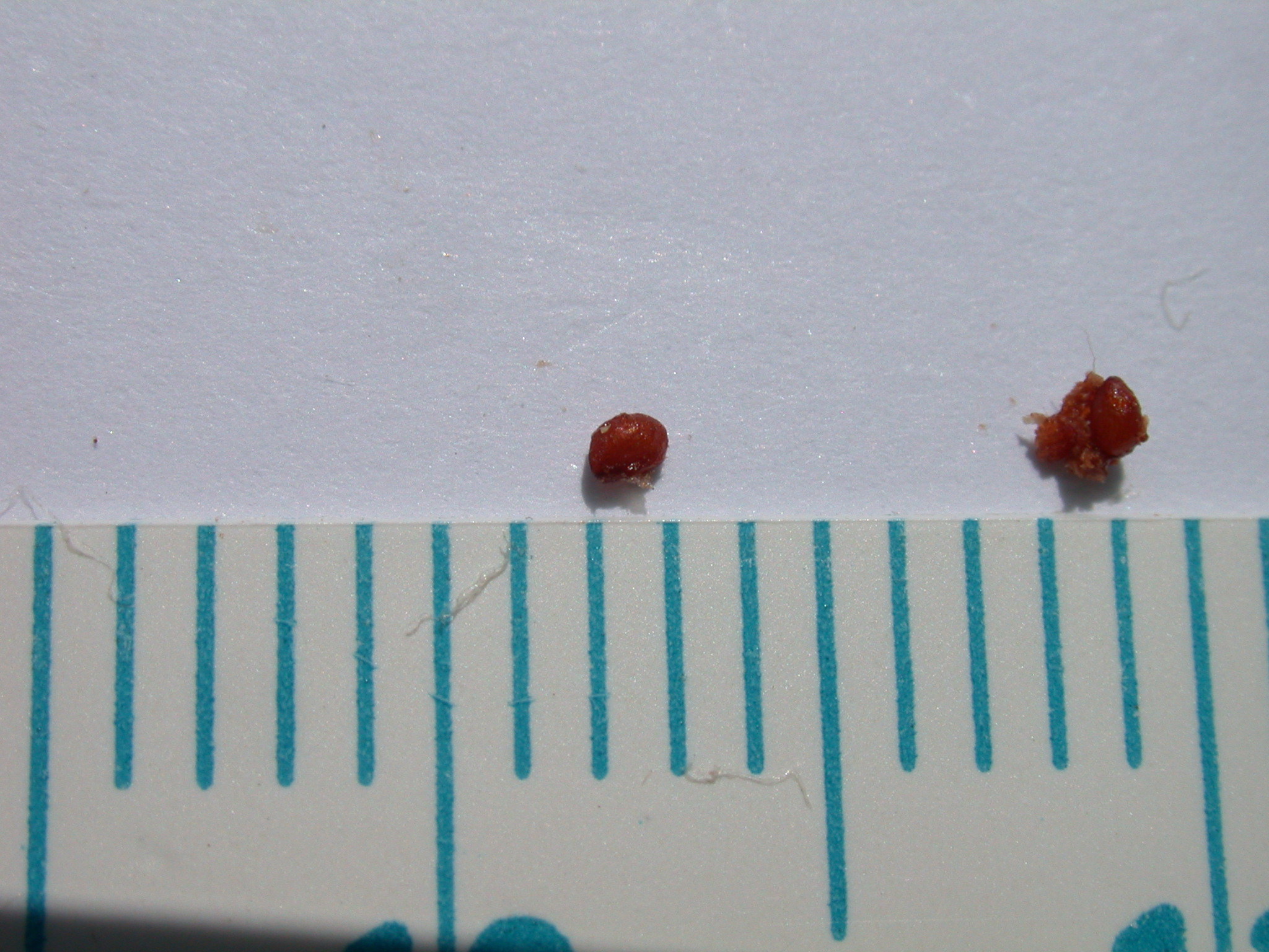 Semena Mammillaria miegiana. Praha, Česká republika.